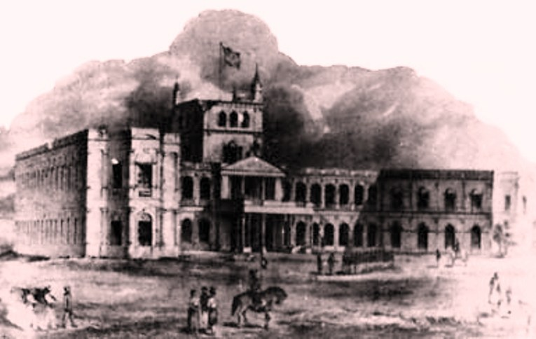 El Palacio de López tras la toma de Asunción por los aliados, convertida luego en el cuartel de caballería riograndense con la bandera brasileña ondeando.